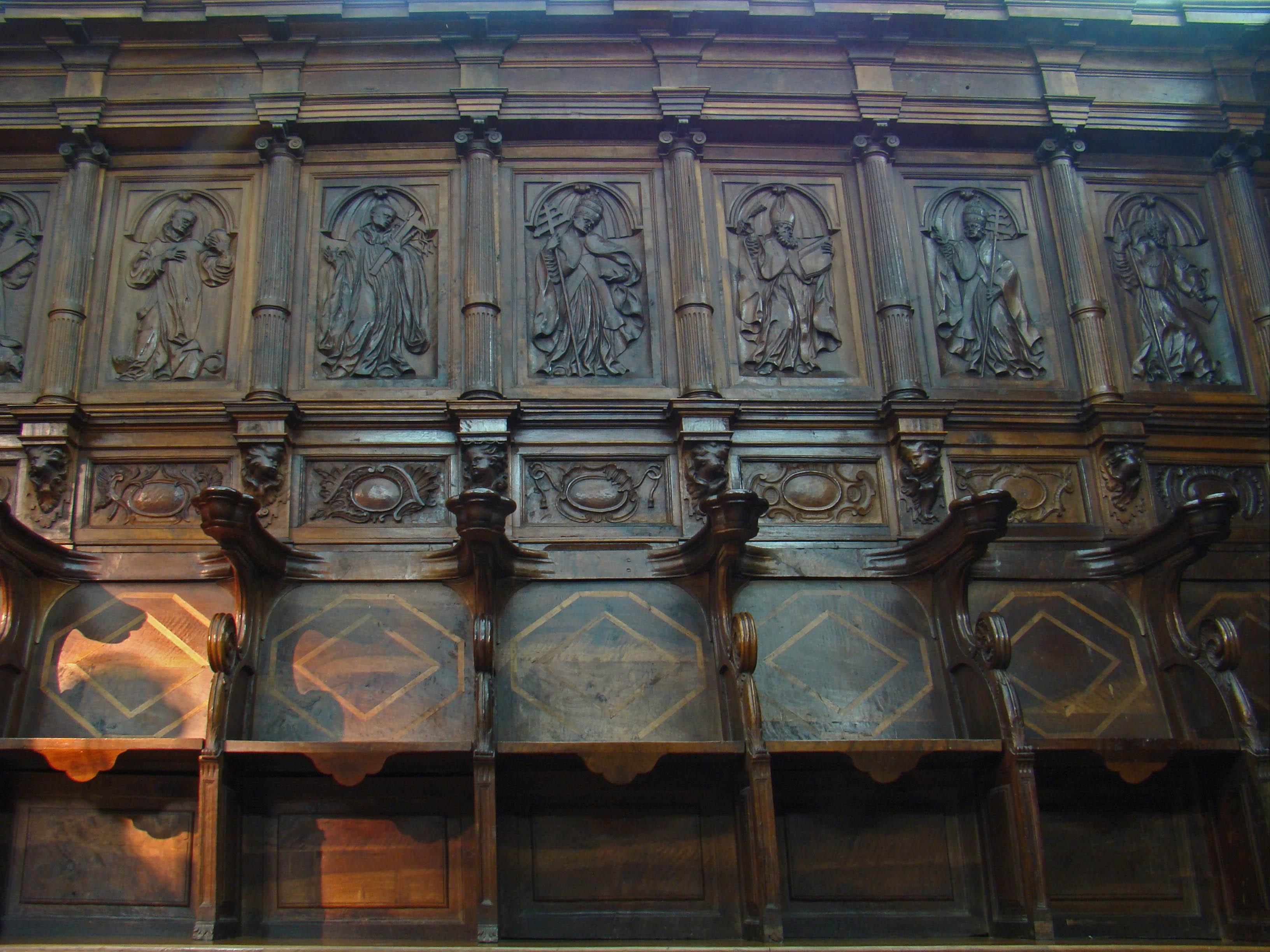 Valladolid, España, catedral (sala capitular dentro del museo). Sillería barroca de Felipe de Espinabete, tallada en 1764 para el coro alto la iglesia del monasterio de San Benito el Real de Valladolid y trasladada a la Catedral en 1867. (Texto de Wikipedia)